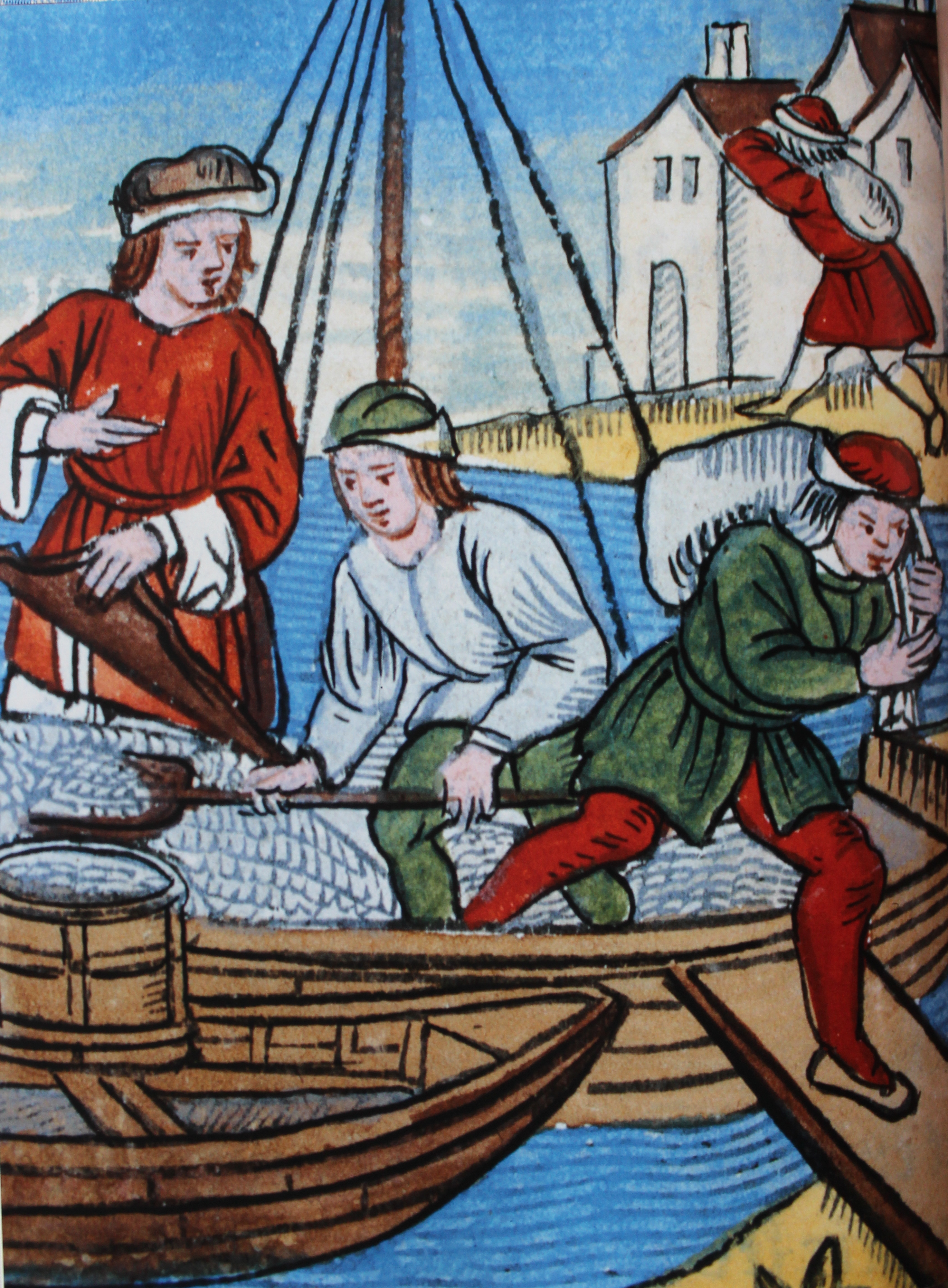 Salzhändler in Paris (Historisches Bild aus dem 15. Jahrhundert)